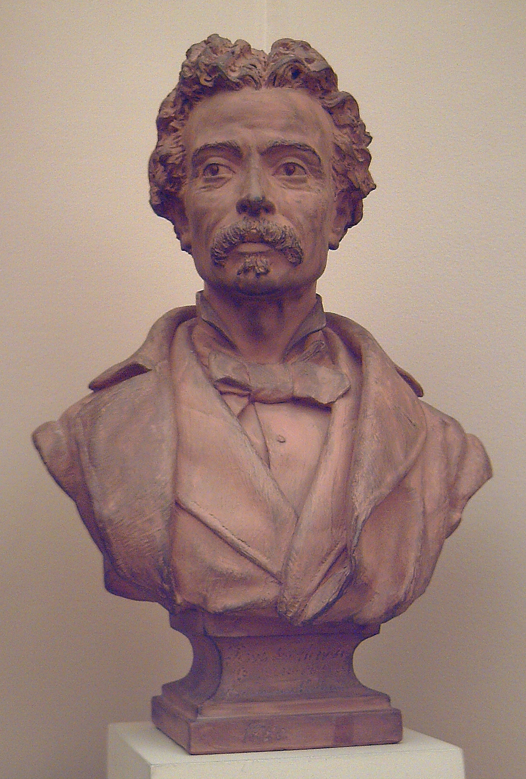 Depicted person: Jesús de Monasterio y Agüeros (1836–1903).